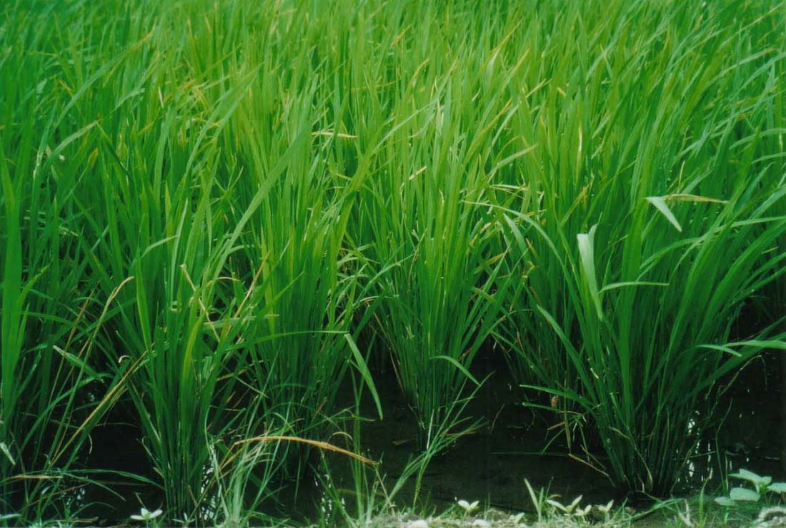 Reis auf Südluzon/Philippinen